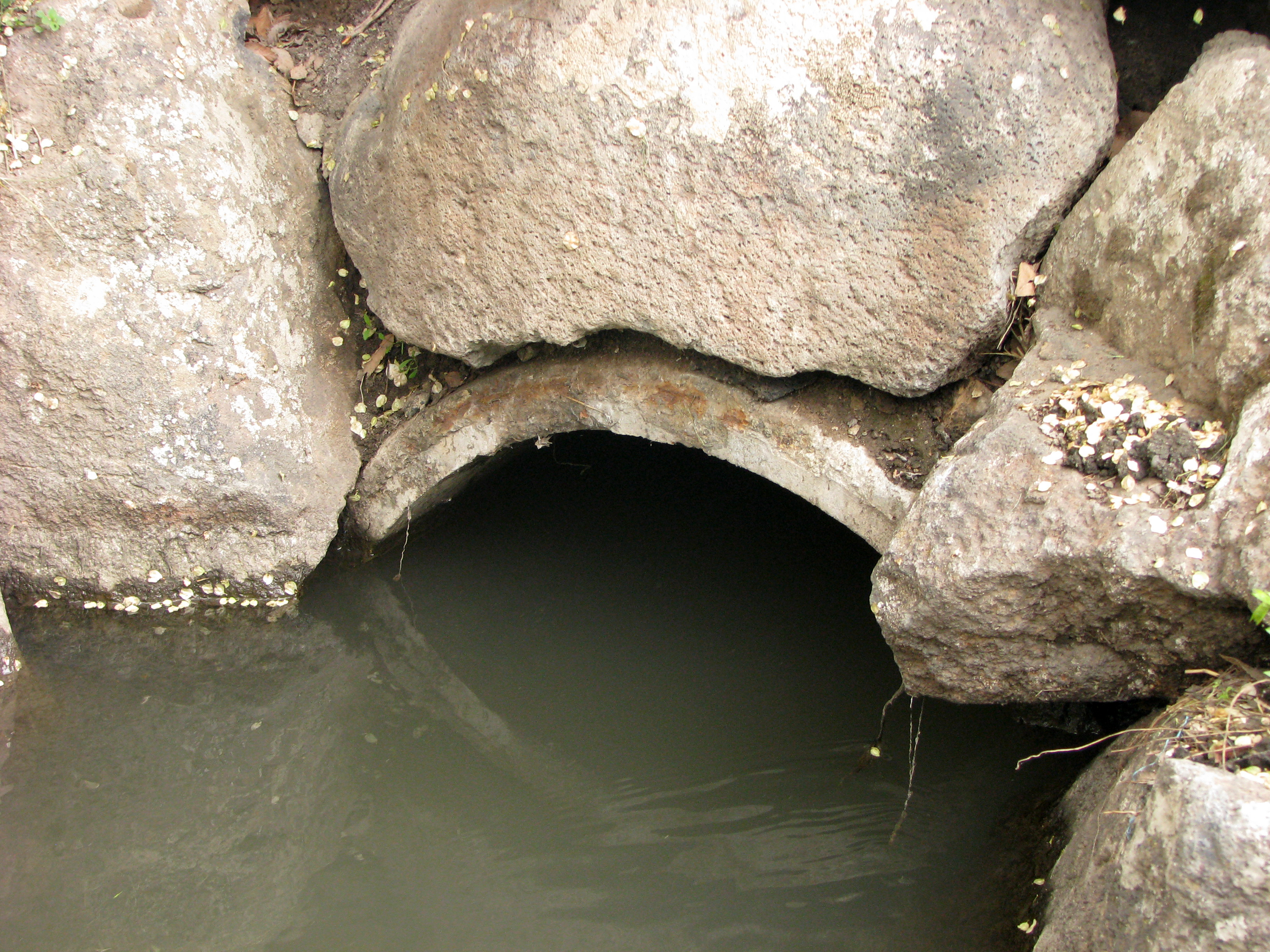 Դալմայի ջրանցքը